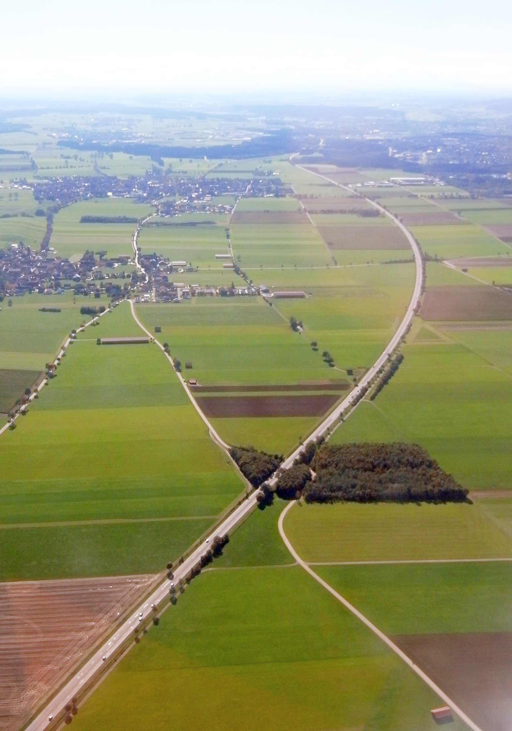 Bundesstraße 12 aus einem Flugzeug gesehen, Blickrichtung Süden, im Mittelgrund Untergermaringen, dahinter Germaringen